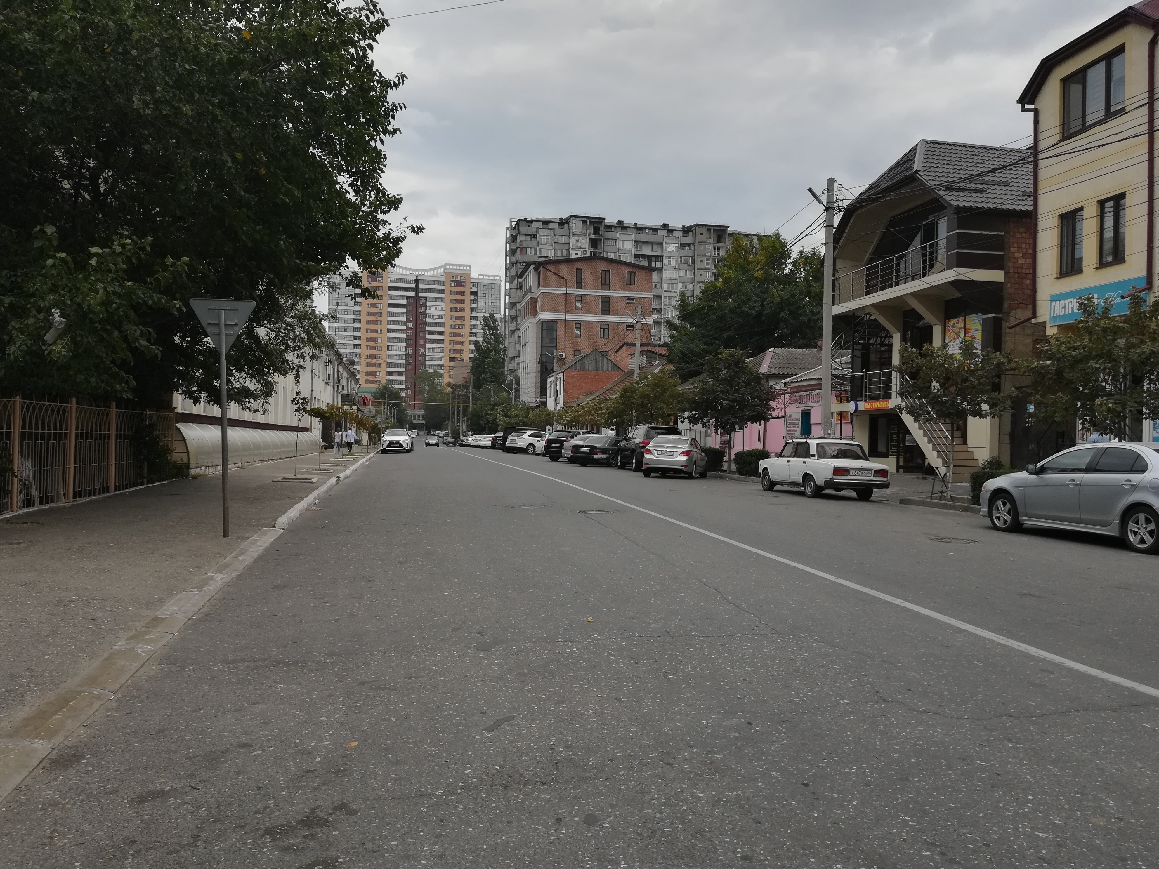 Махачкала